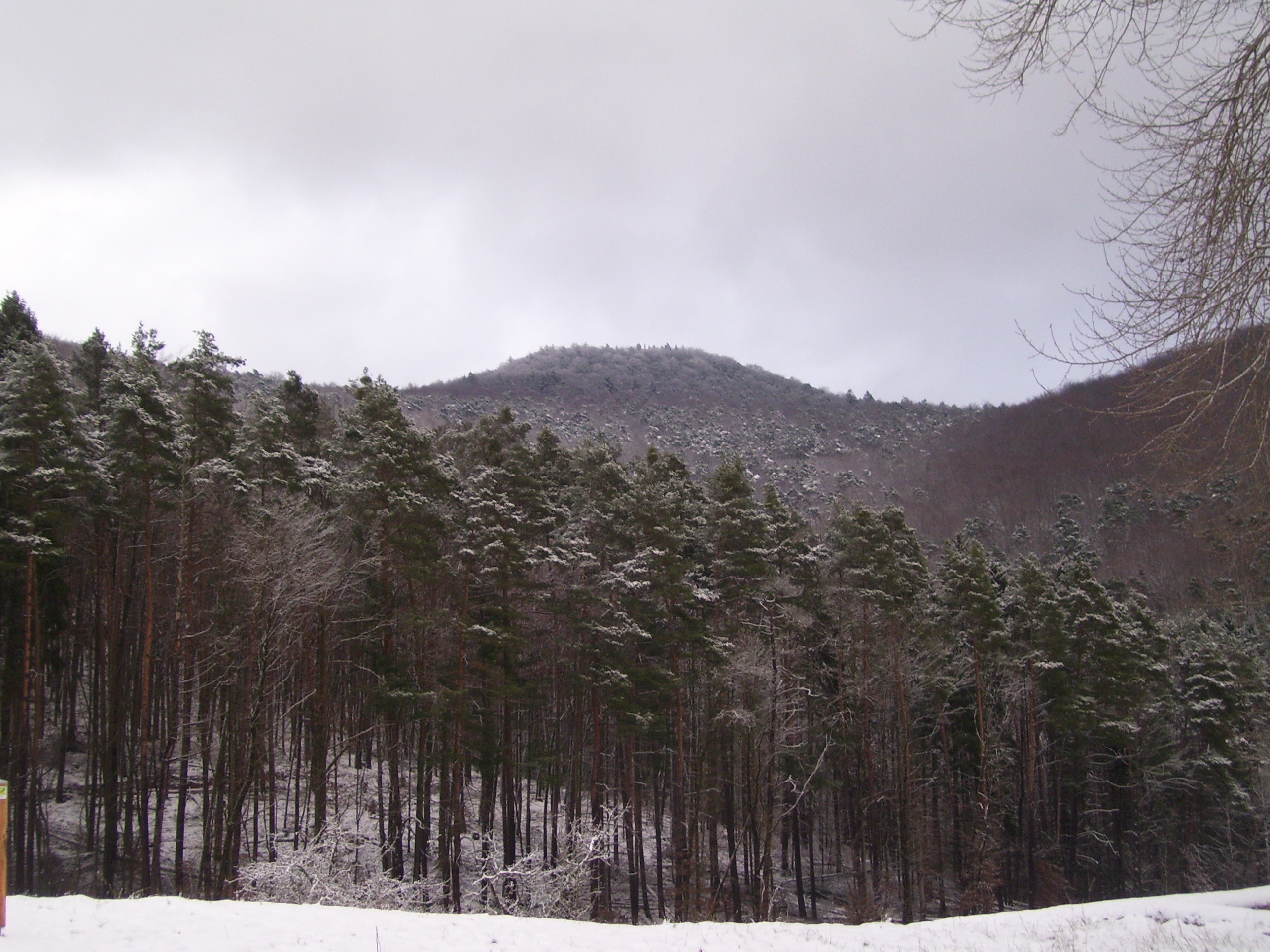 Der Bobenthaler Knopf, der höchste Berg des Wasgaus (ca. 600m). Dieser liegt im Biosphärenreservat Pfälzerwald.